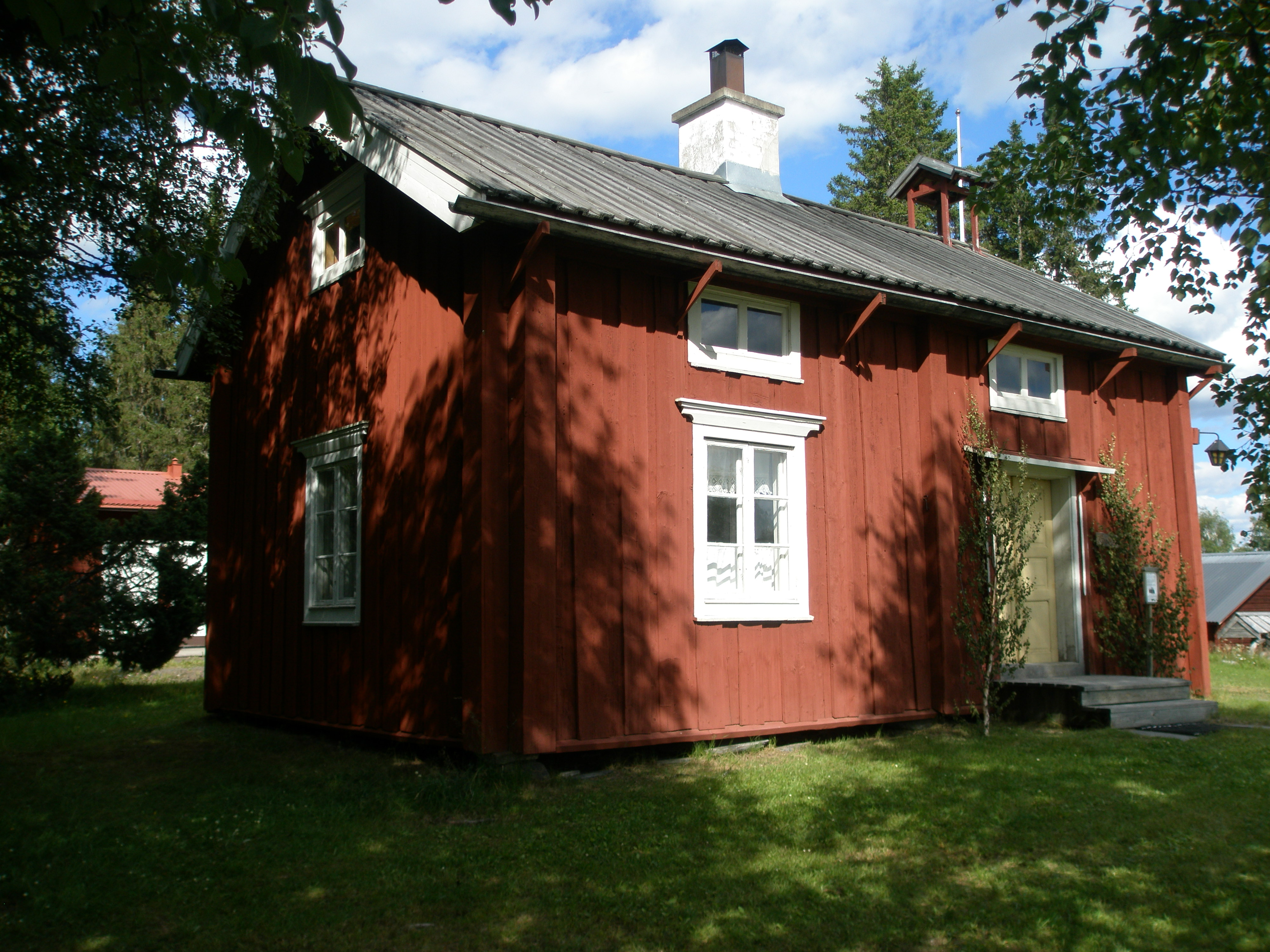 Bakstuga (bryggstu) på Offerdals hembygdsgård i Ede, Offerdals socken, Krokoms kommun, Jämtland, Sverige.